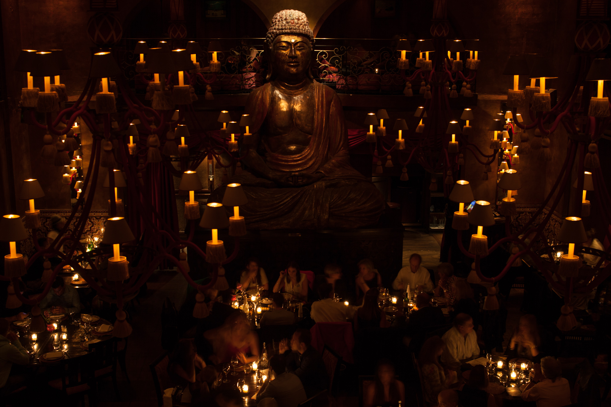 Buddha-Bar Paris, 8-12 rue Boissy d'Anglas, Paris, France.